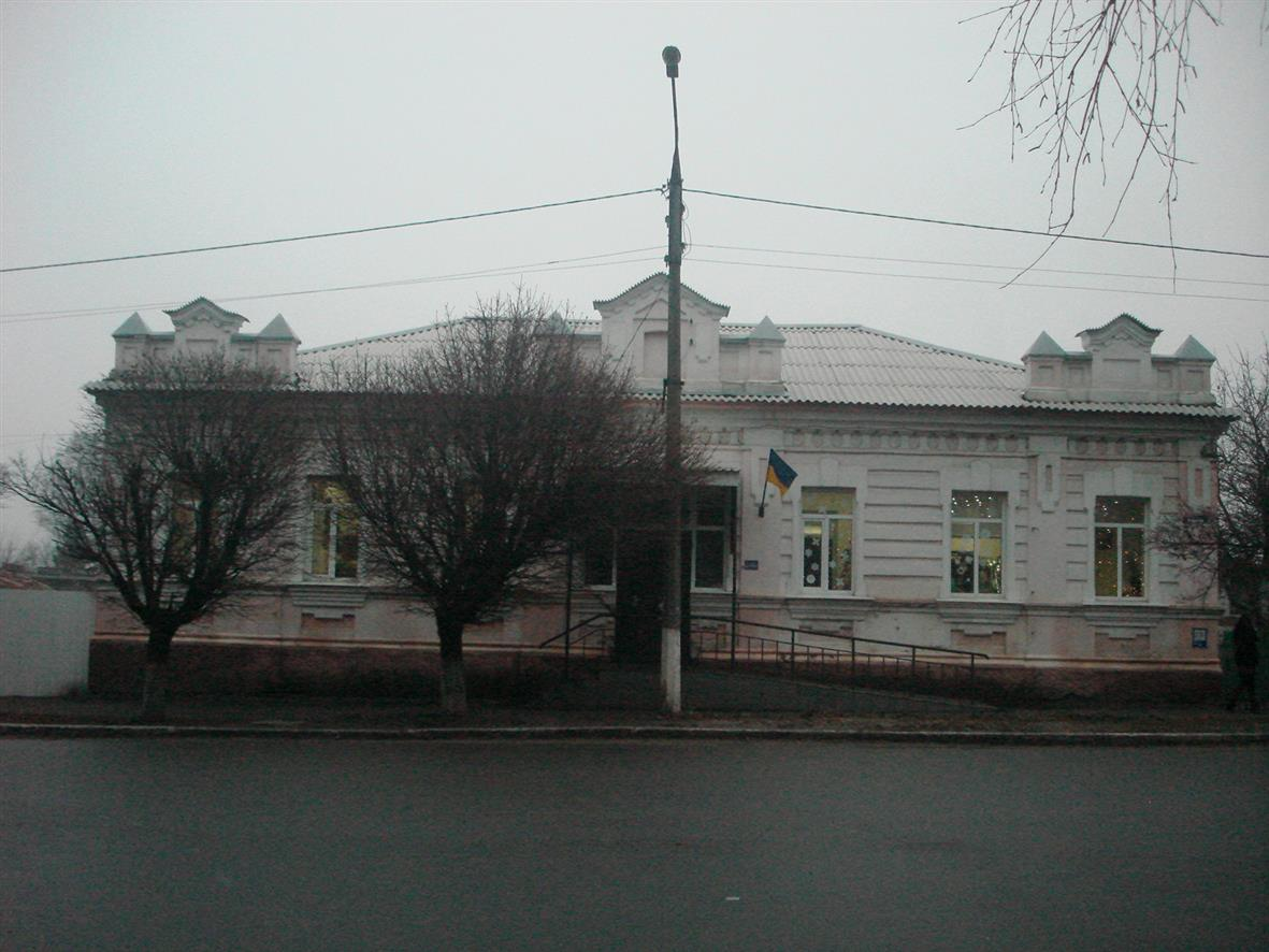 Ізюмське міське БТІ, Ізюм, вулиця Покровська, 57